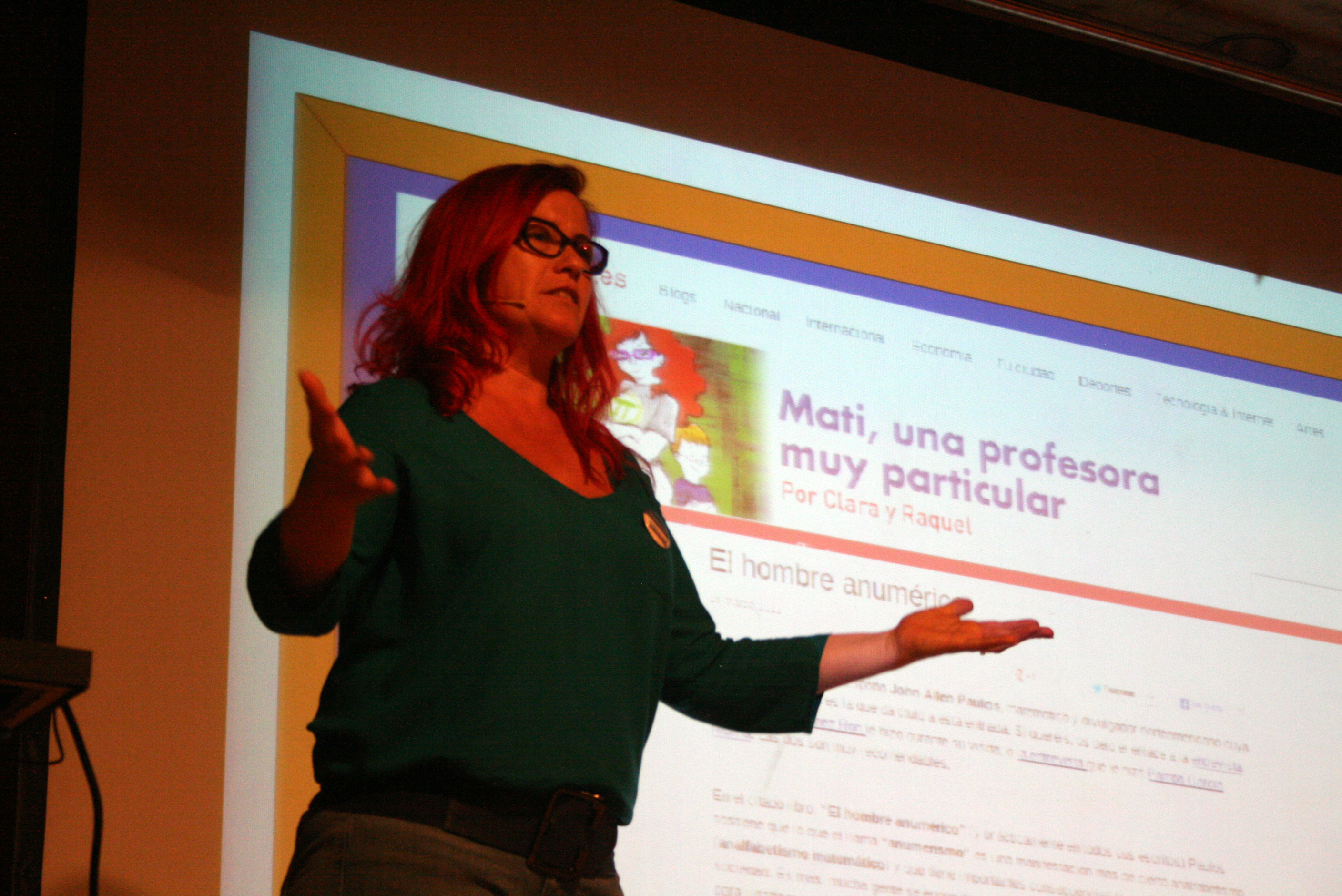 Clara Grima. Jornada Ciencia en Redes. Asociación Española de Comunicación Científica. 17 mayo 2013, Casa Encendida Madrid.